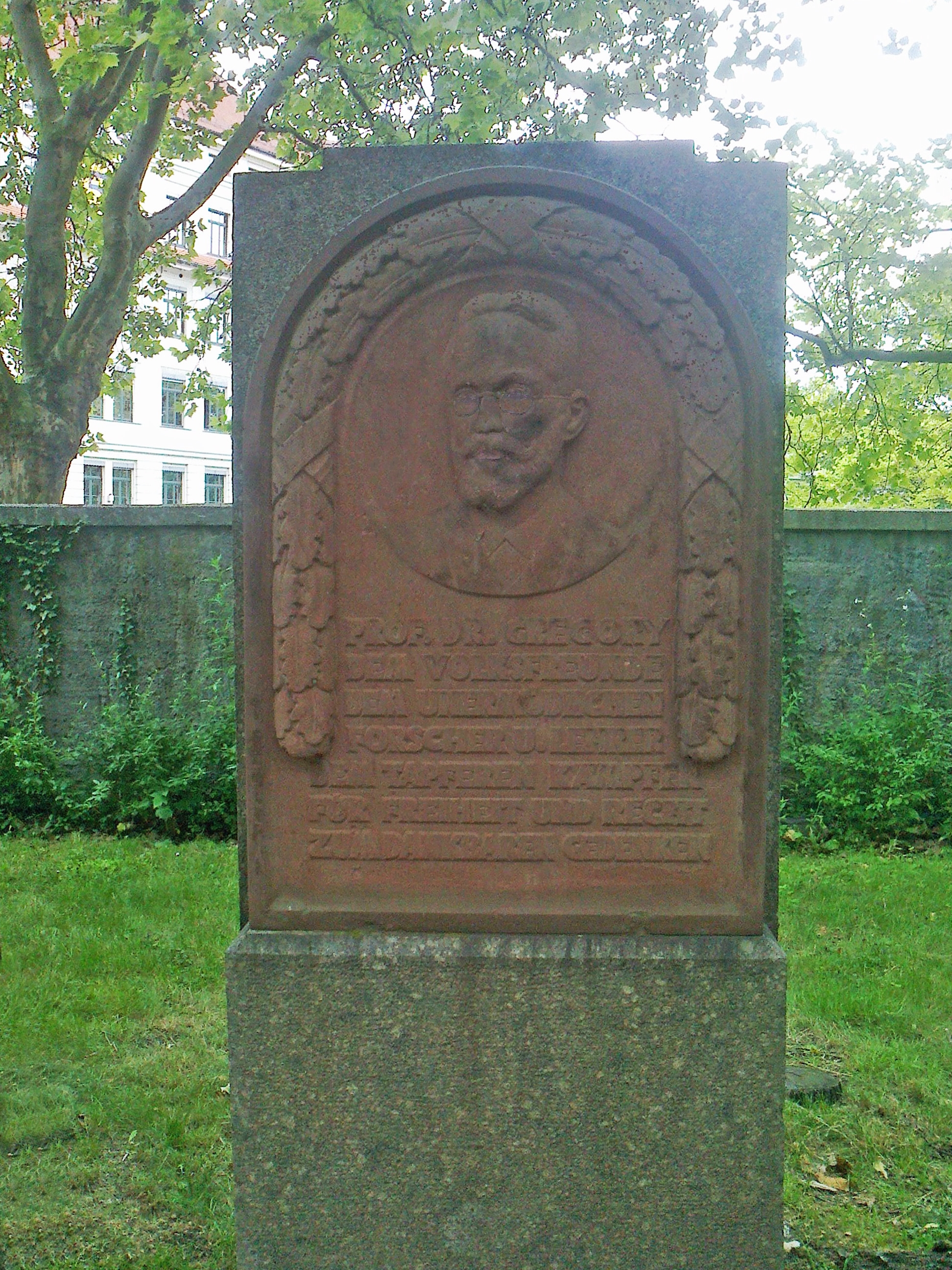 Caspar-René-Gregory Denkmal in der Naunhofer Straße in Leipzig